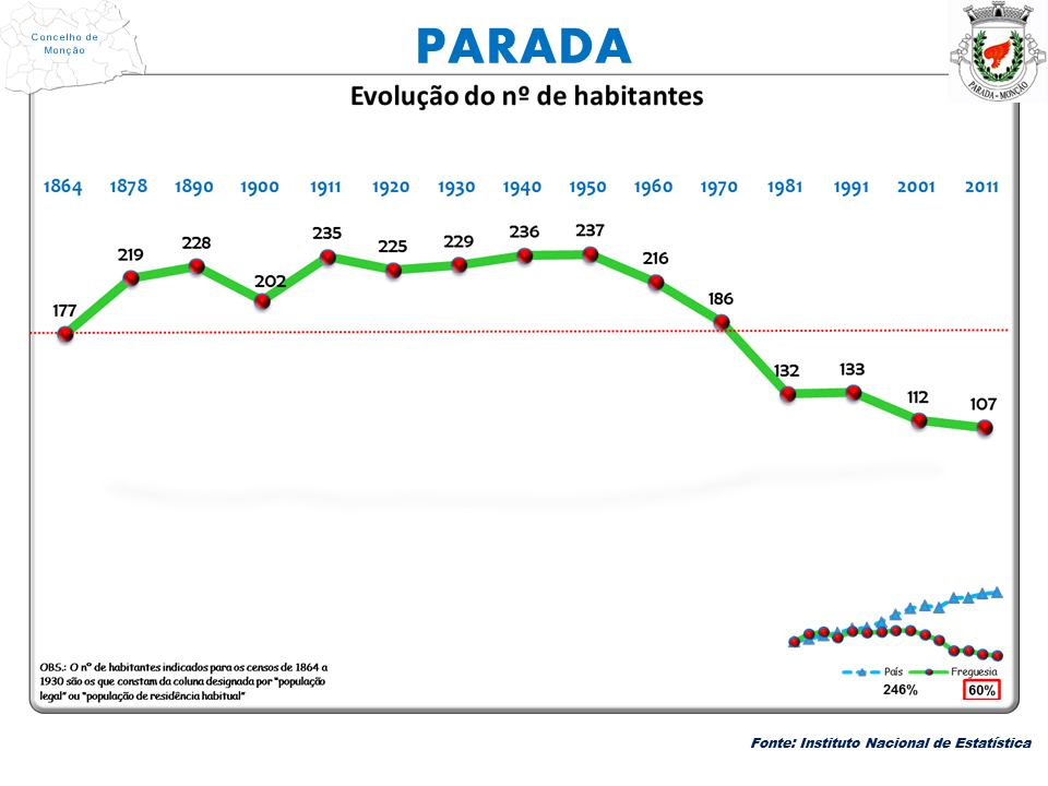 Censos 1864/2011